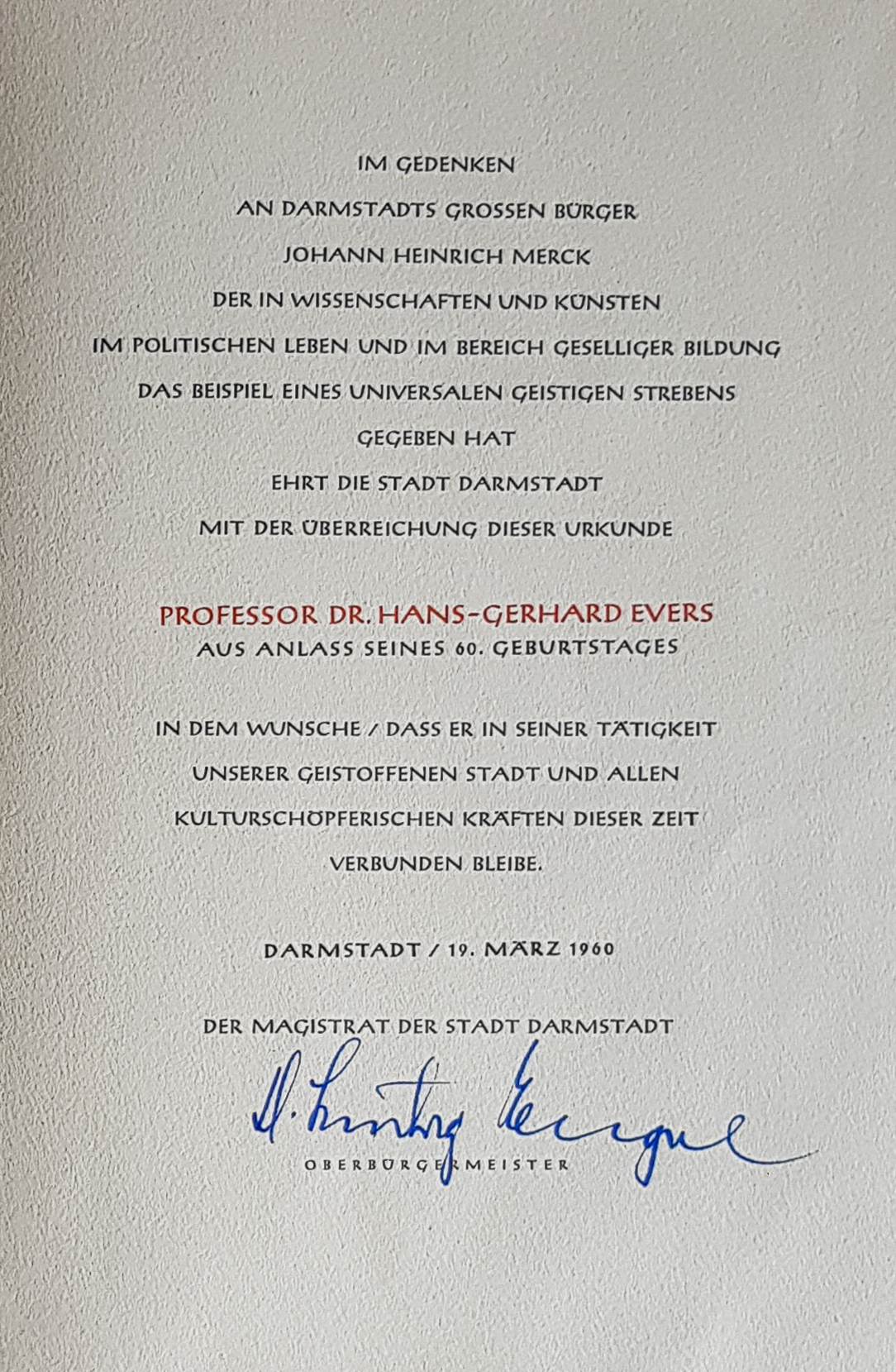 Text der Urkunde: IM GEDENKEN AN DARMSTADTS GROSSEN BÜRGER JOHANN HEINRICH MERCK DER IN WISSENSCHAFTEN UND KÜNSTEN IM POLITISCHEN LEBEN UND IM BEREICH GESELLIGER BILDUNG DAS BEISPIEL EINES UNIVERSALEN STREBENS GEGEBEN HAT EHRT DIE STADT DARMSTADT MIT DER ÜBERREICHUNG DIESER URKUNDE PROFESSOR DR. HANS-GERHARD EVERS AUS ANLASS SEINES 60. GEBURTSTAGES IN DEM WUNSCHE / DASS ER IN SEINER TÄTIGKEIT UNSERER GEISTOFFENEN STADT UND ALLEN KULTURSCHÖPFERISCHEN KRÄFTEN DIESER ZEIT VERBUNDEN BLEIBE. DARMSTADT / 19. MÄRZ 1960 DER MAGISTRAT DER STADT DARMSTADT GEZ. DR. LUDWIG ENGEL OBERBÜRGERMEISTER